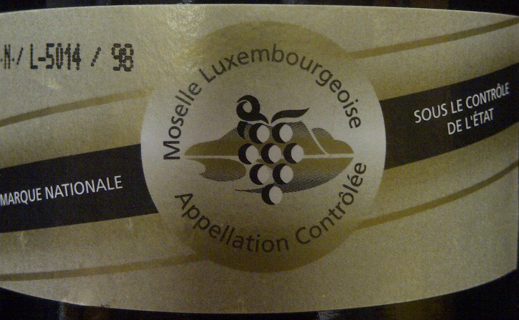 Étiquette "marque nationale" - unique système d'appellation contrôlée pour les vins luxembourgeois